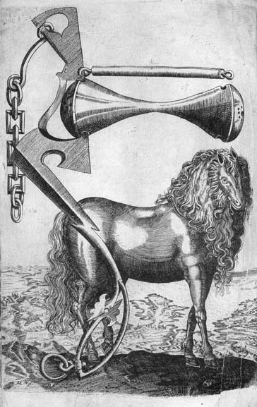 Беларуская (тарашкевіца): Крыштап Дарагастайскі «Гіпіка, альбо Кніга пра коней»